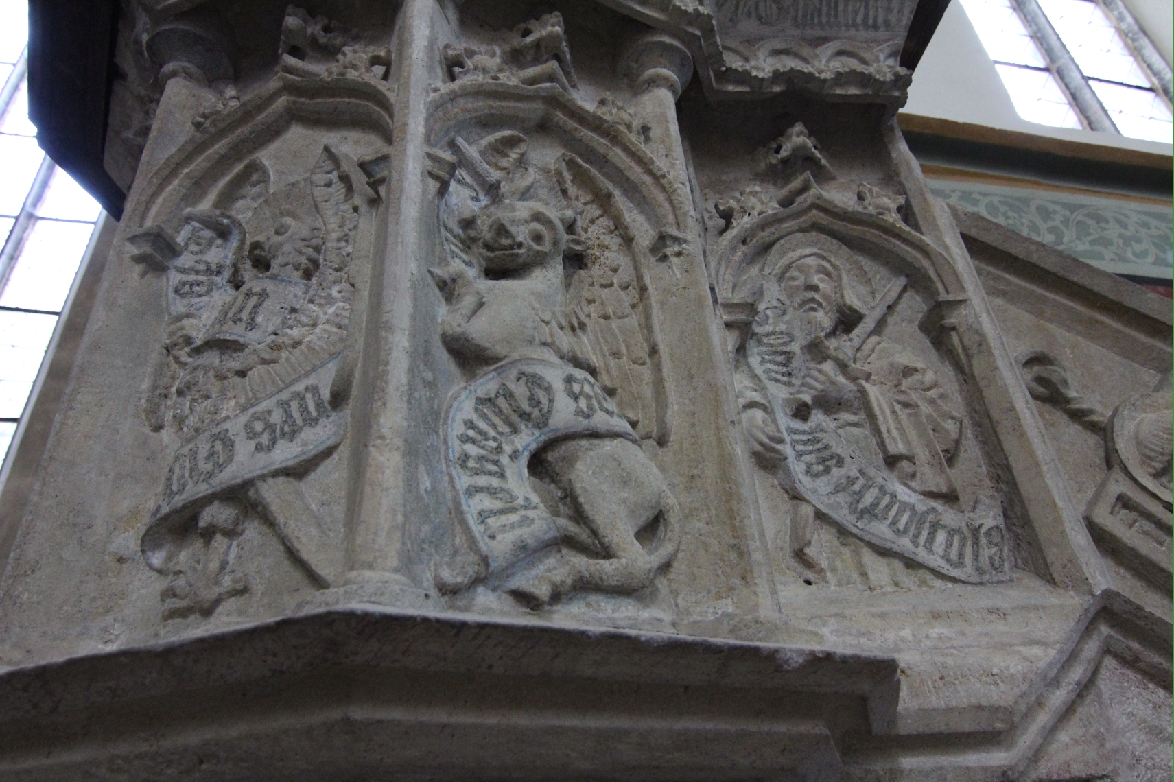 Pozdně gotická kazatelna v kostele Sv. Vavřince na Kaňku - detail výzdoby z profilu - atributy evangelistů